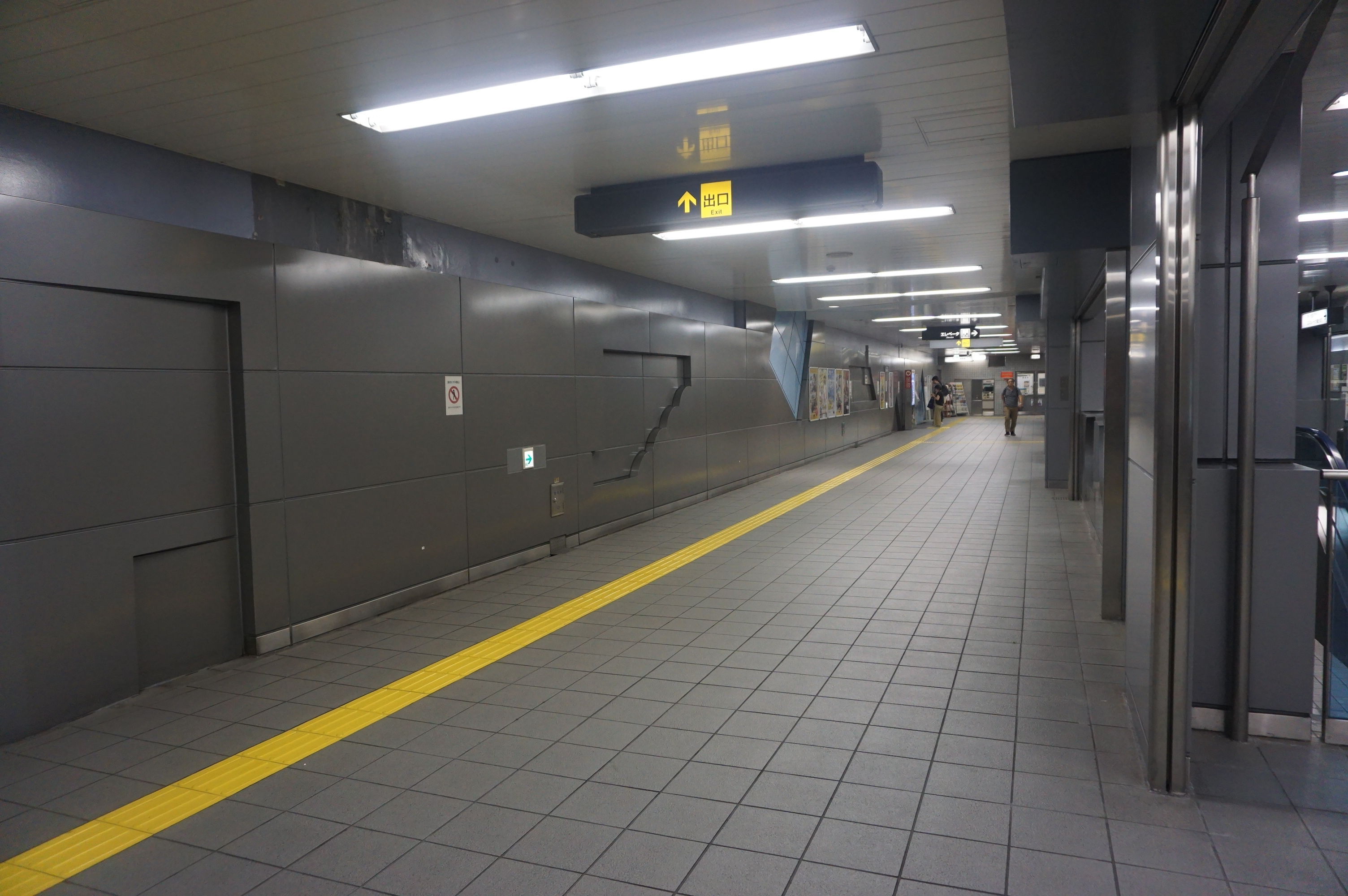 西大橋駅改札内コンコース Sony ILCE-6000